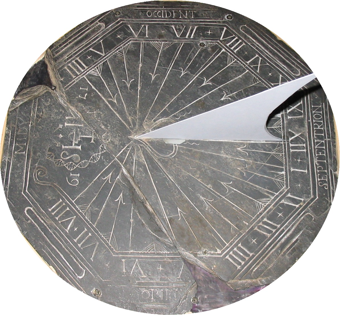 Cadran solaire horizontal de Nicolas du Pineau, Montergon à Brain-sur-Longuenée (49220)-France